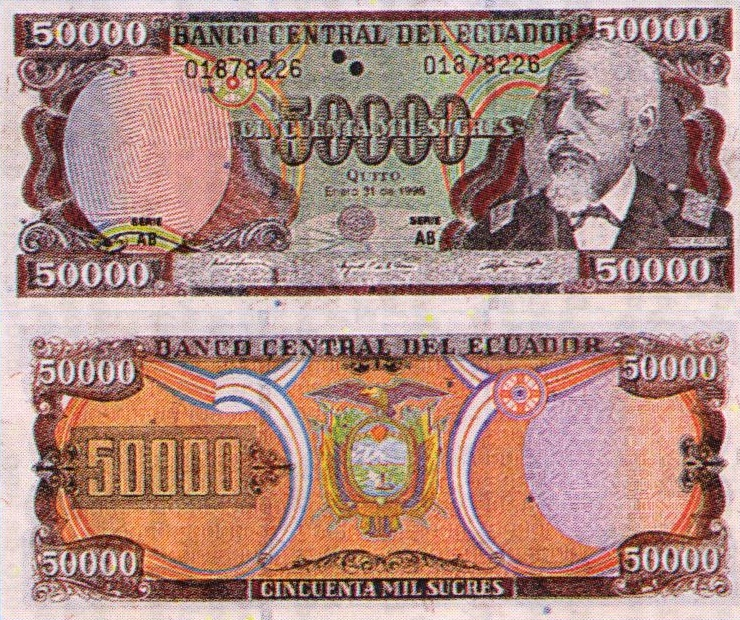 Ecuadorian 50000 Sucres bill